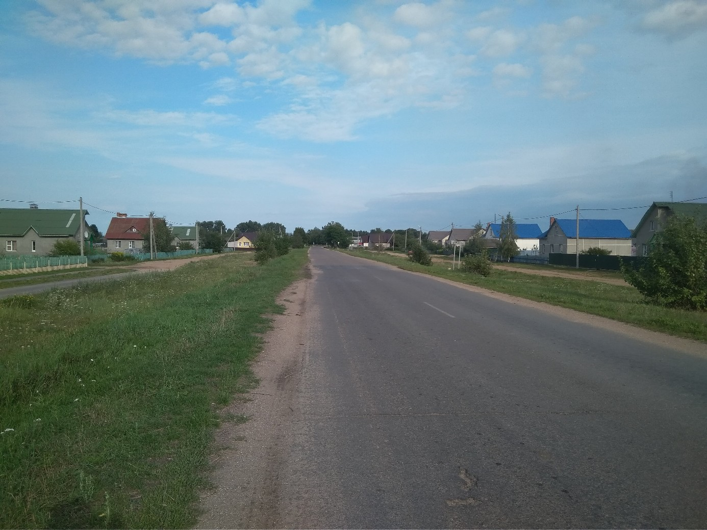 Пейзаж агрогородка Боровое Дзержинского района Минской области, западный въезд